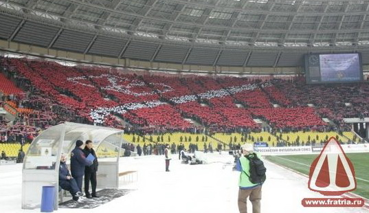 Первый перфоманс 2006 года